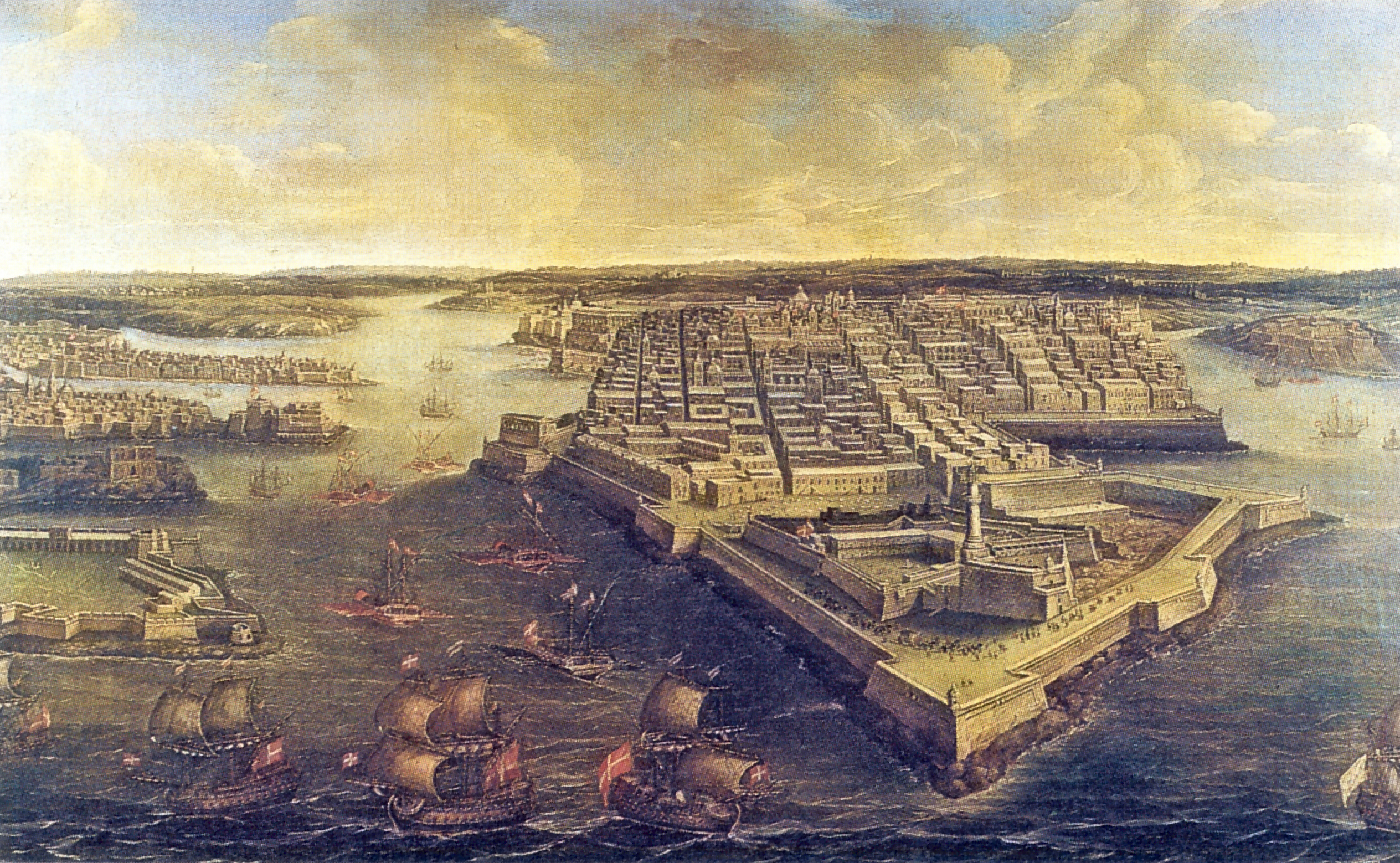 Gemälde des Hafens von Valletta